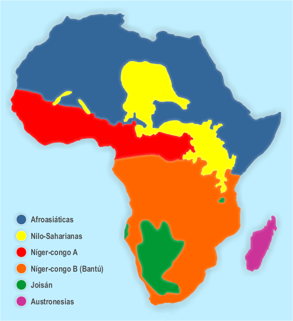 Familias lingüísticas de África; versión en español